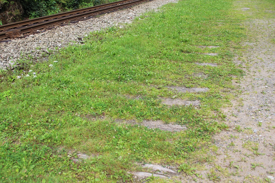 Železniční zastávka Návarov - zbytky kusé koleje u bývalého nákladiště